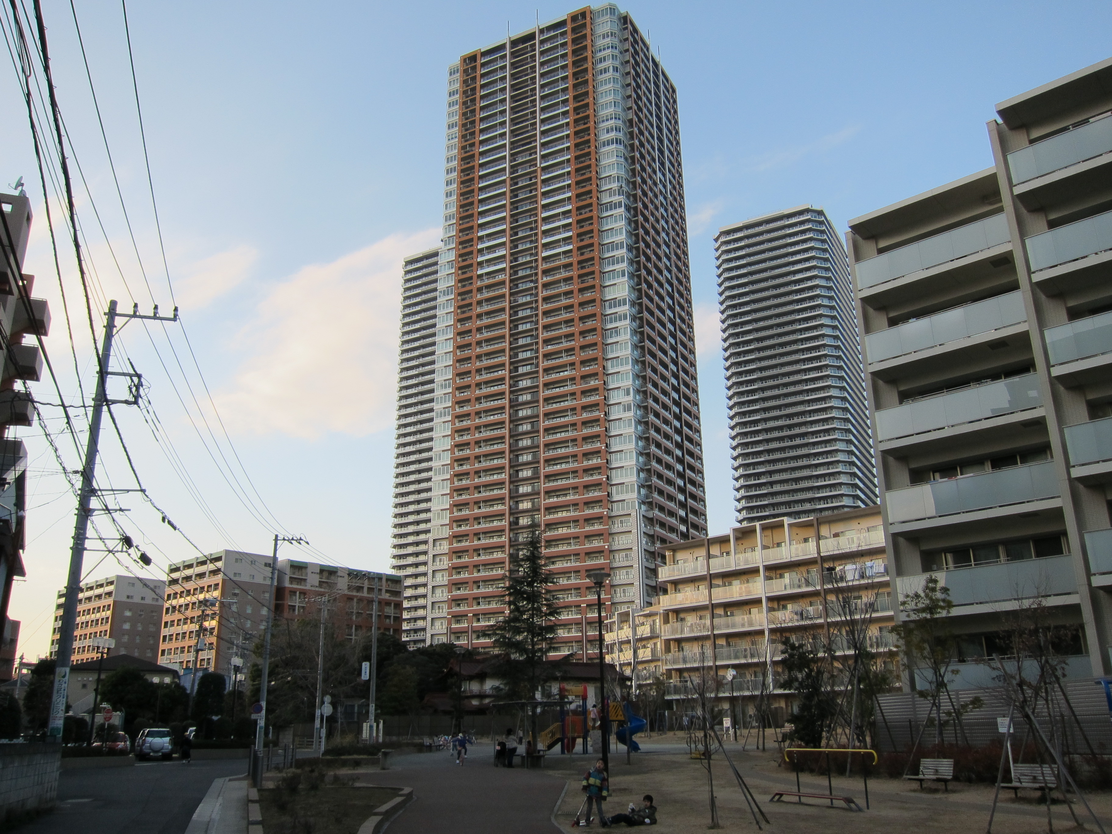 Nakamaruko tower blocks , Musashi-Kosugi , Kawasaki